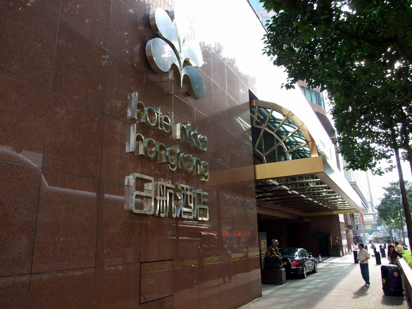 香港日航酒店